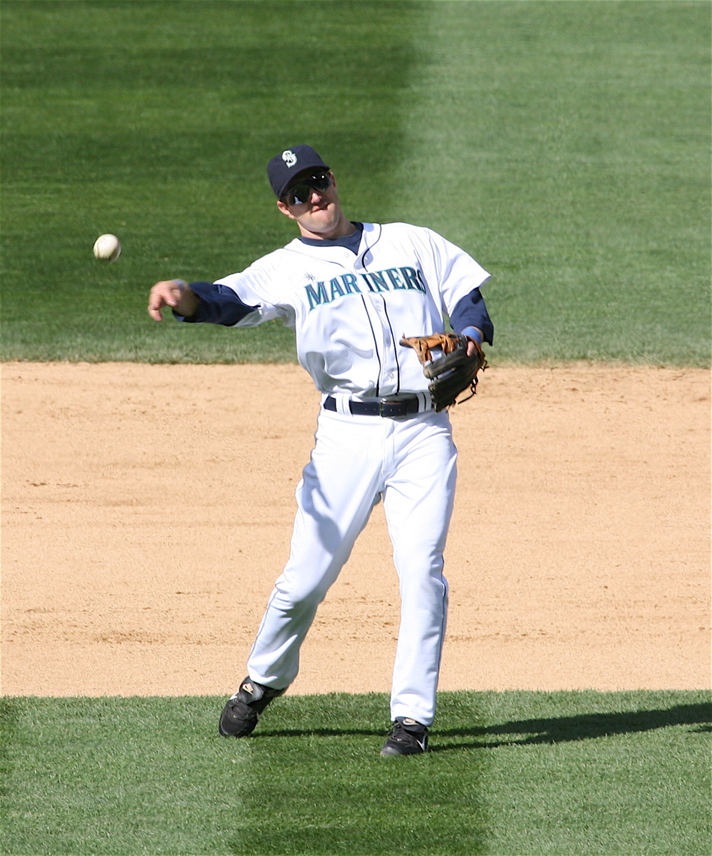 Willie Bloomquist